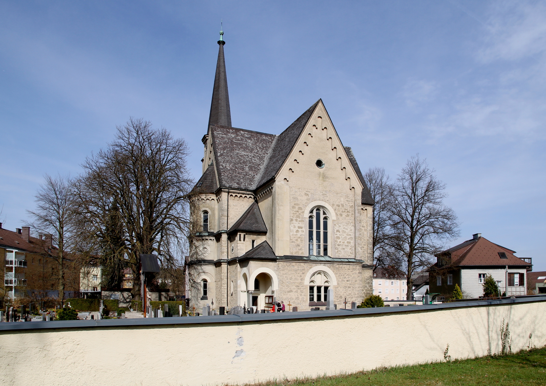 Evangelische Pfarrkirche A.B. in der oberösterreichischen Stadt Vöcklabruck. In neuromanischem Stil nach Plänen von Hermann Wehrenfenig in den Jahren 1871 bis 1875 errichtet.